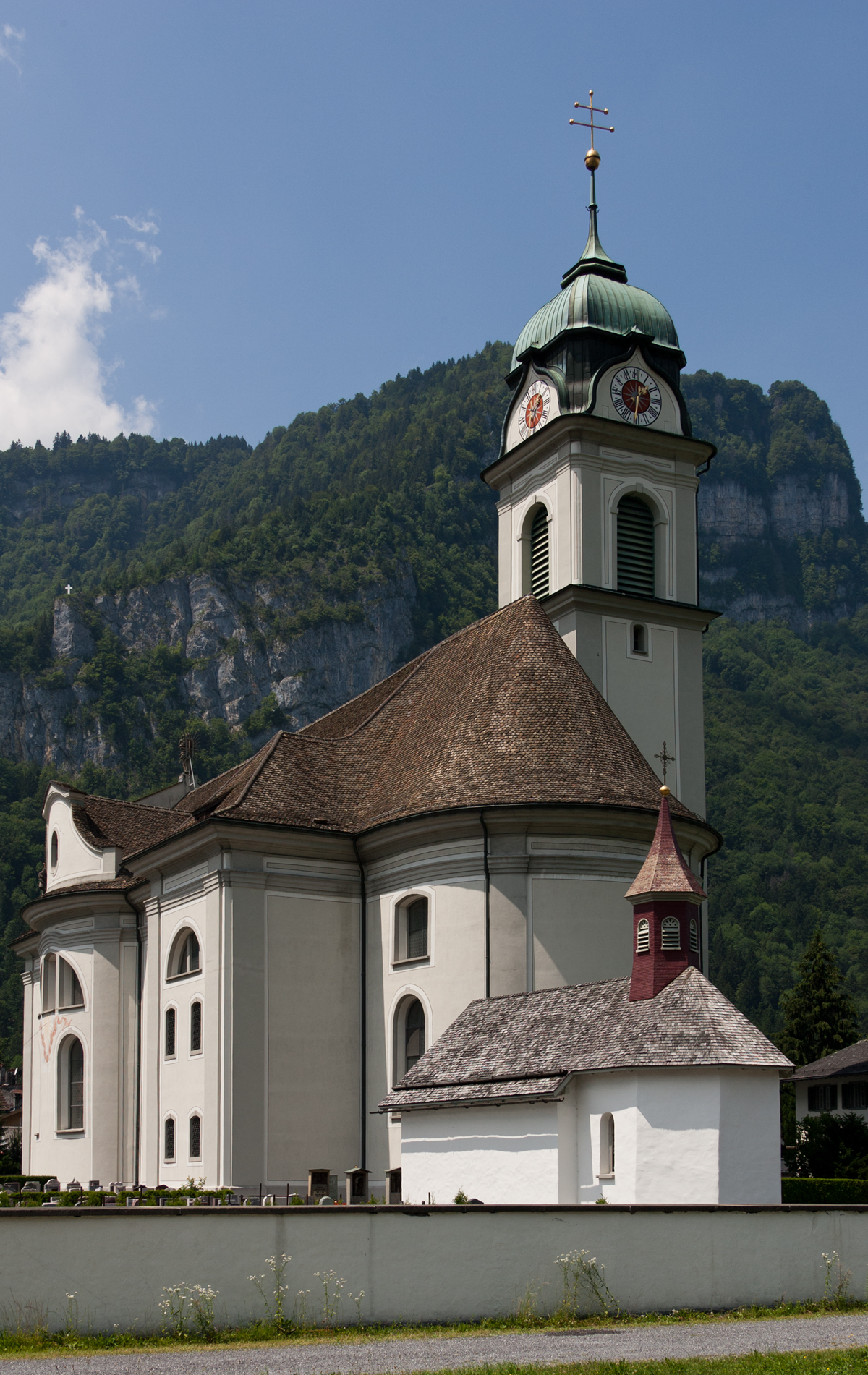 Kirche St.Hilarius in Näfels (Gemeine Glarus-Nord)